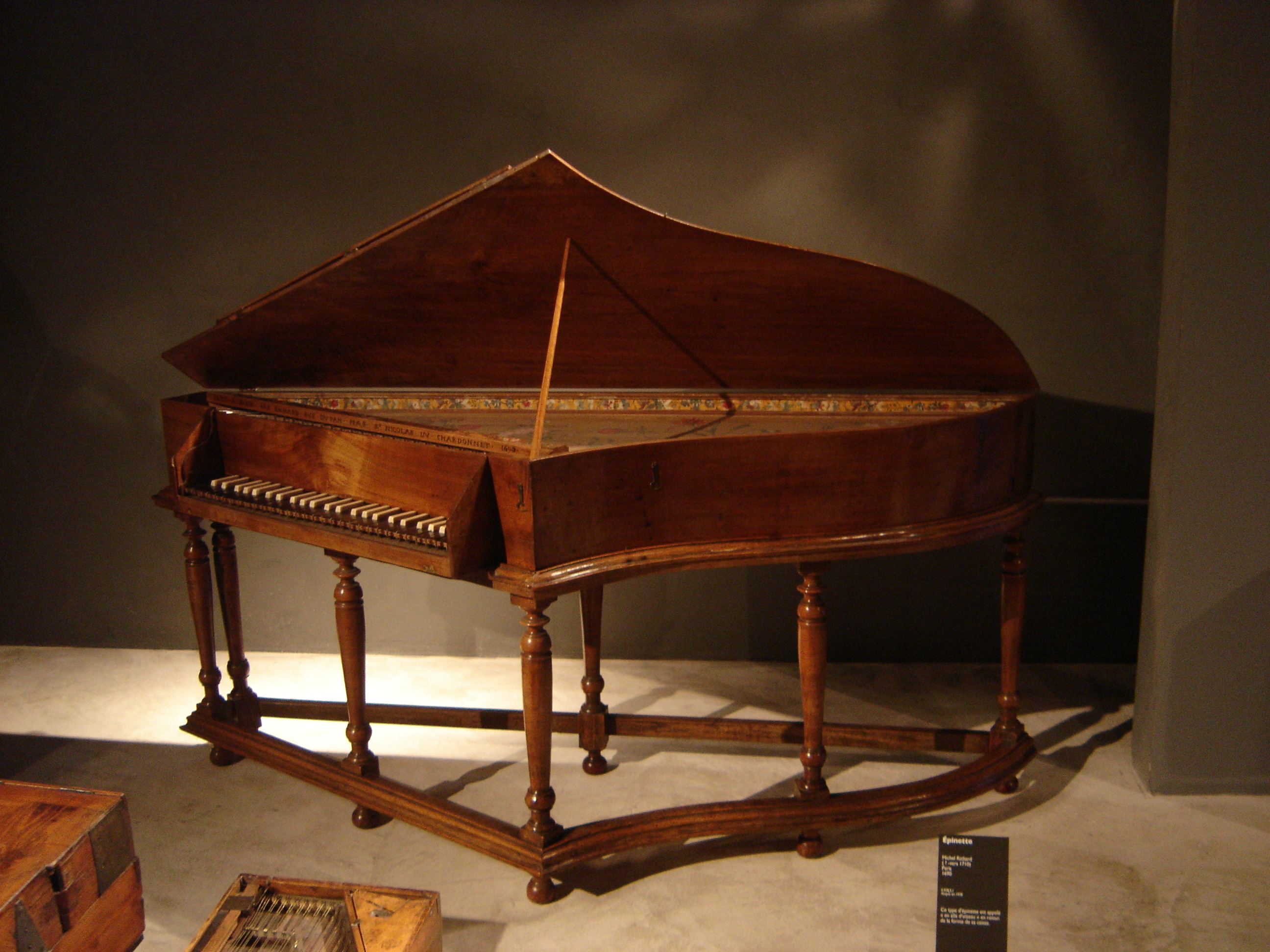 Epinette par Michel Richard (Paris, vers 1675) - Paris, Musée de la Musique